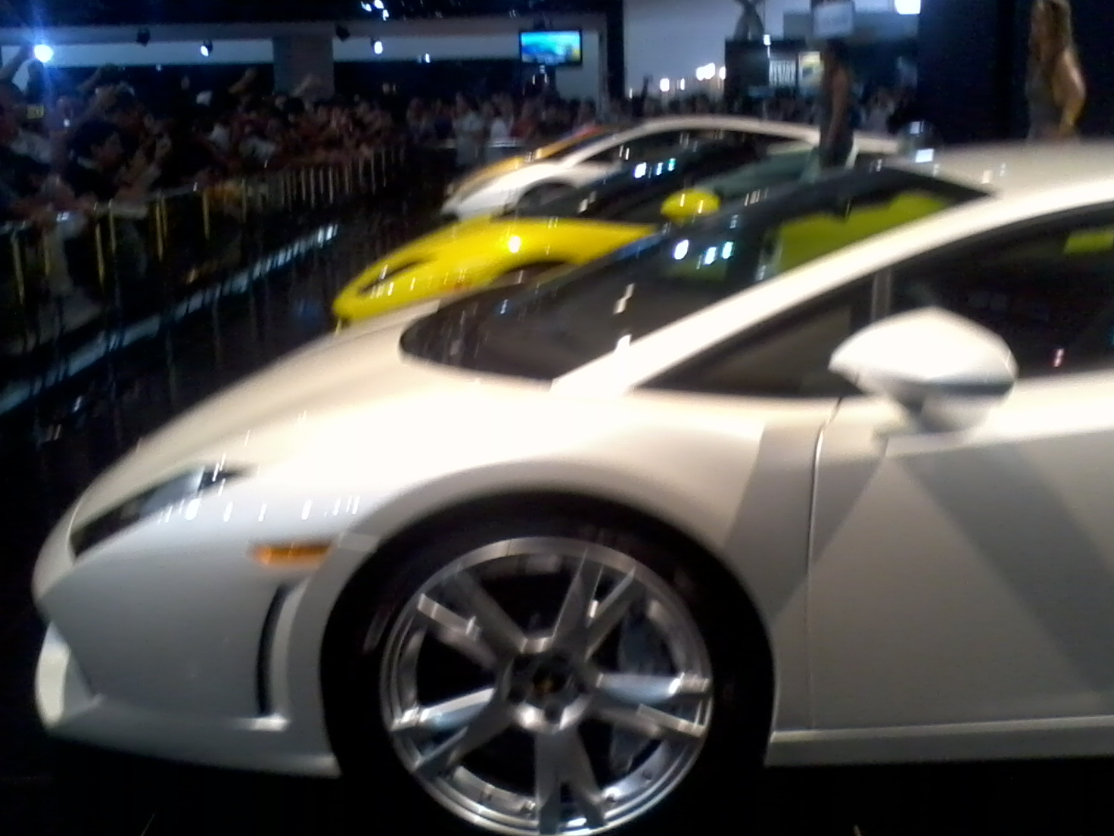 lamborghini no Salão do Automovel em São paulo